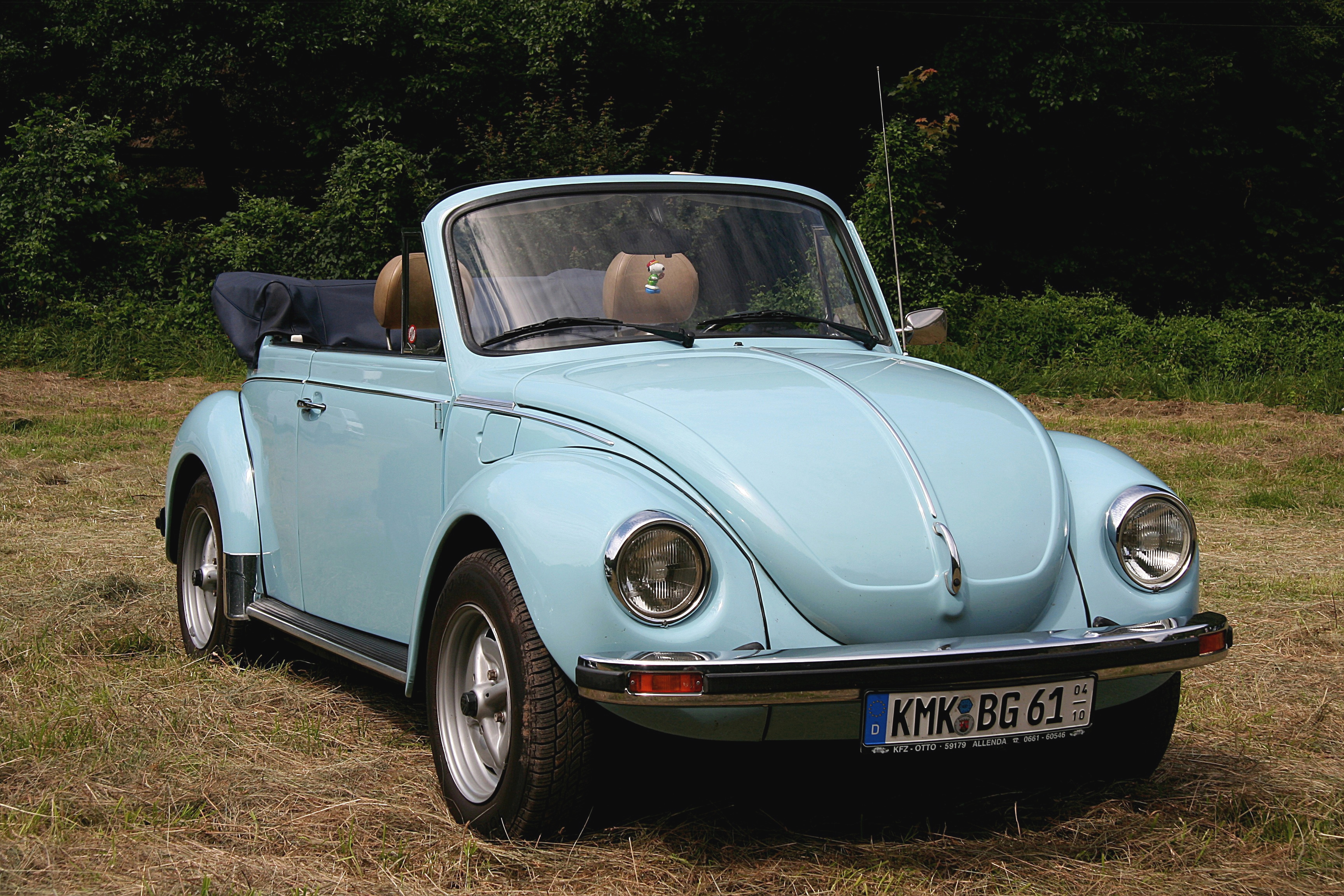 VW 1303 Cabriolet (Bauzeit Dezember 1972 bis 10. Januar 1980).